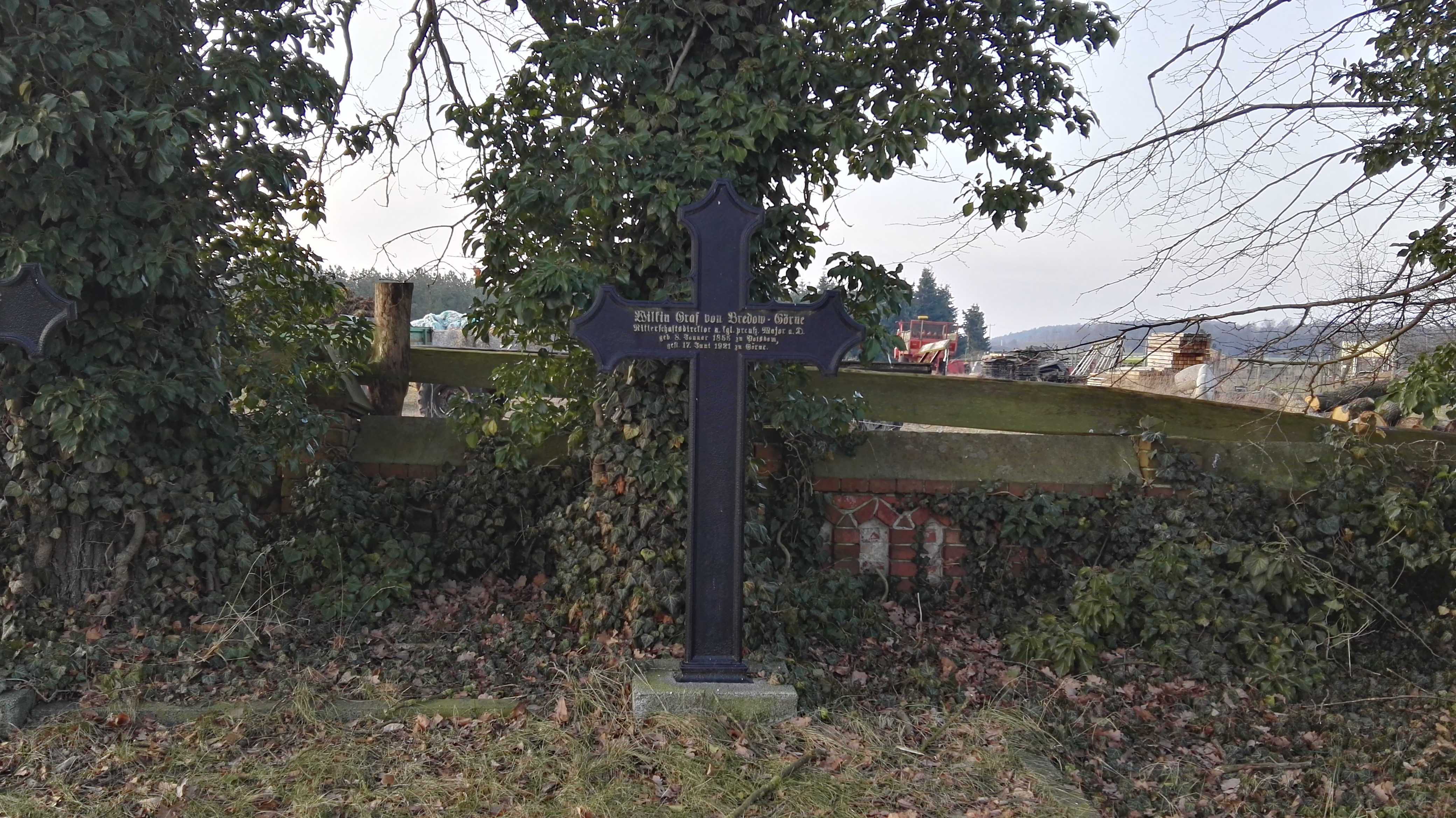 Grab von Wilkin Graf von Bredow auf dem Friedhof in Görne (Gemeinde Kleßen-Görne) in Brandenburg, Deutschland